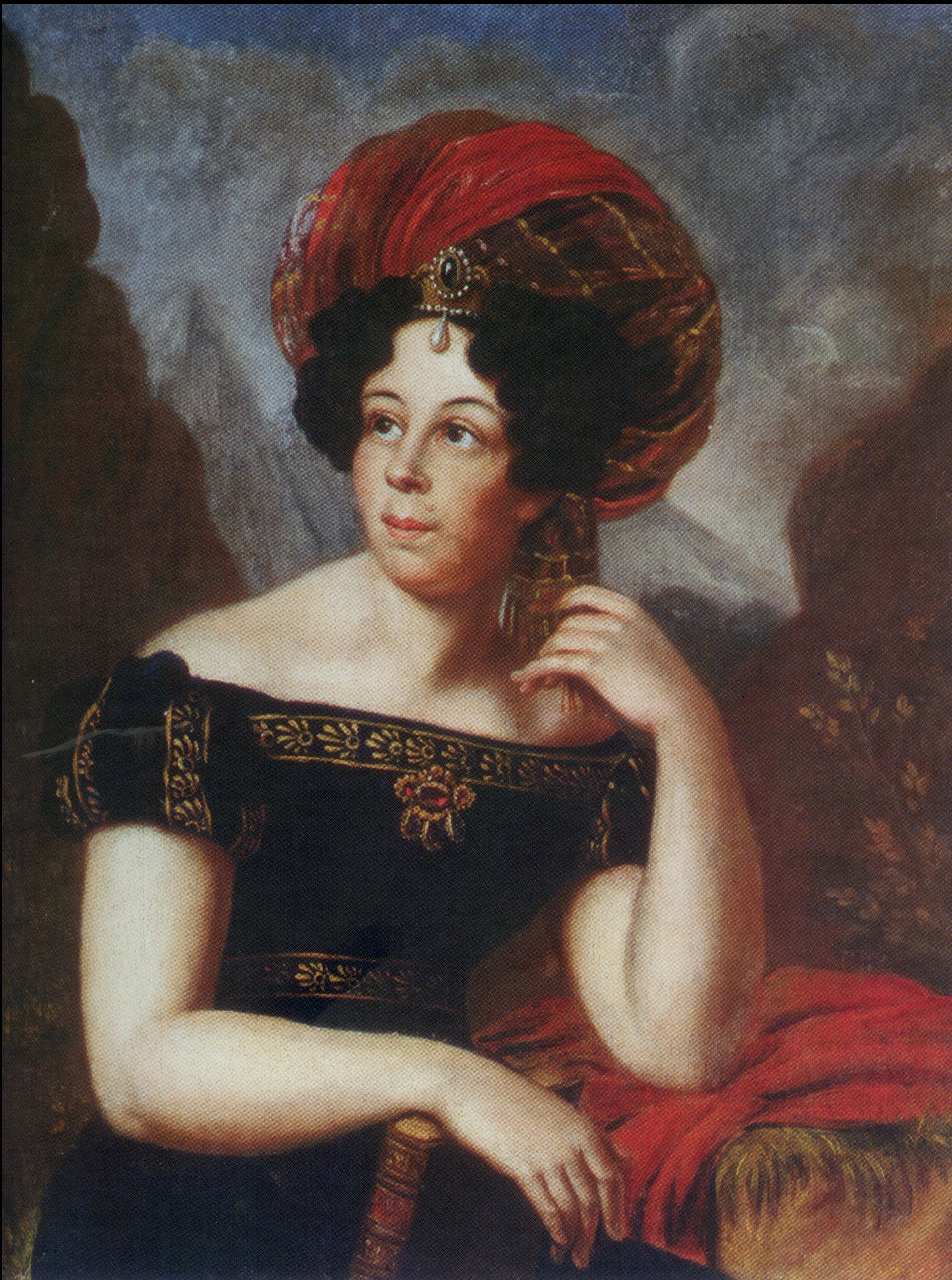 Екатерина Петровна Риччи, урожденная Лунина (1787-1886), знакомая Пушкина, музыкант и певица.